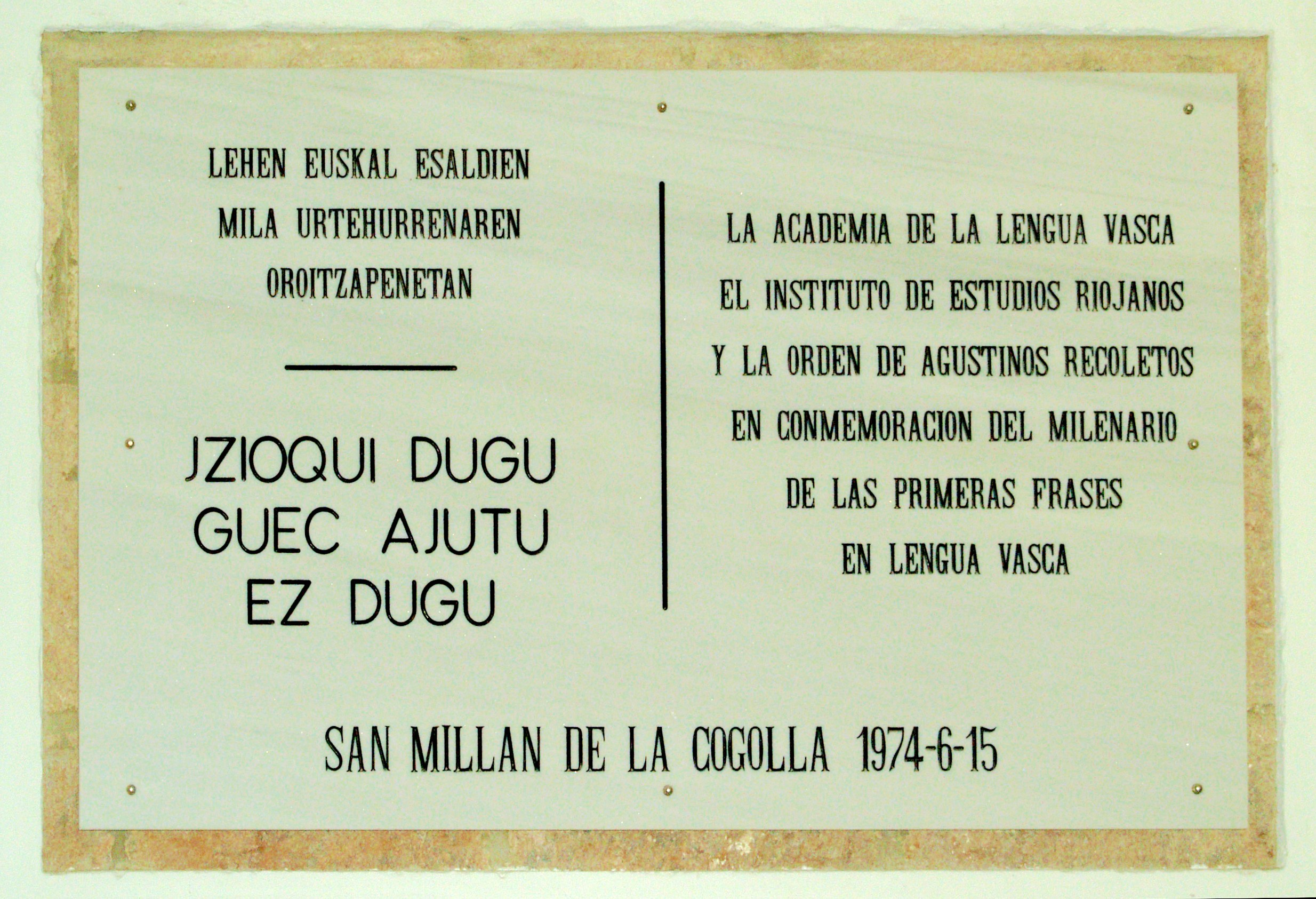 Primeras palabras en vascuence o euskera en el monasterio de Yuso, San Millán de la Cogolla, La Rioja (España).